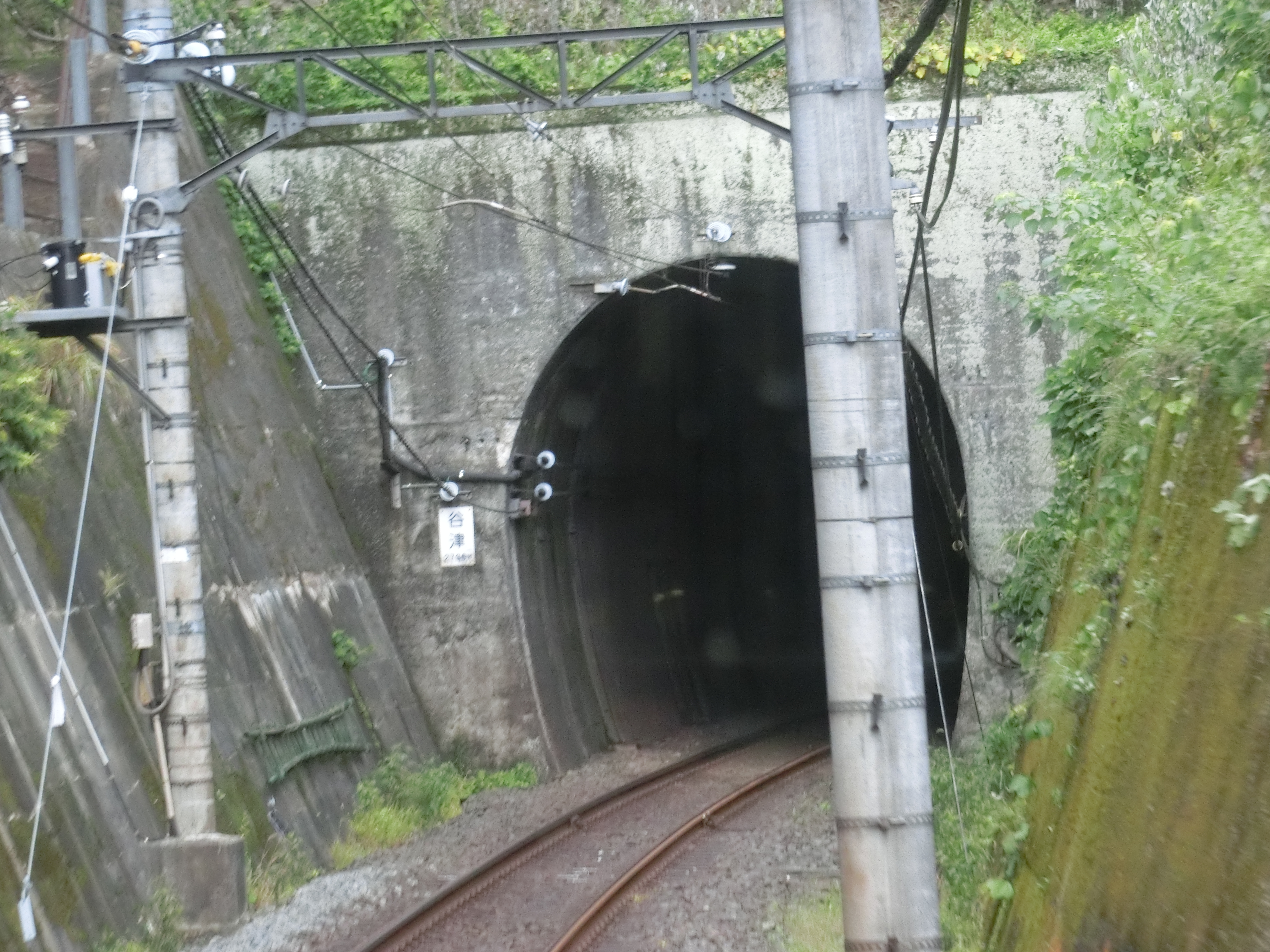 谷津隧道 伊豆急下田側 平成３０年９月